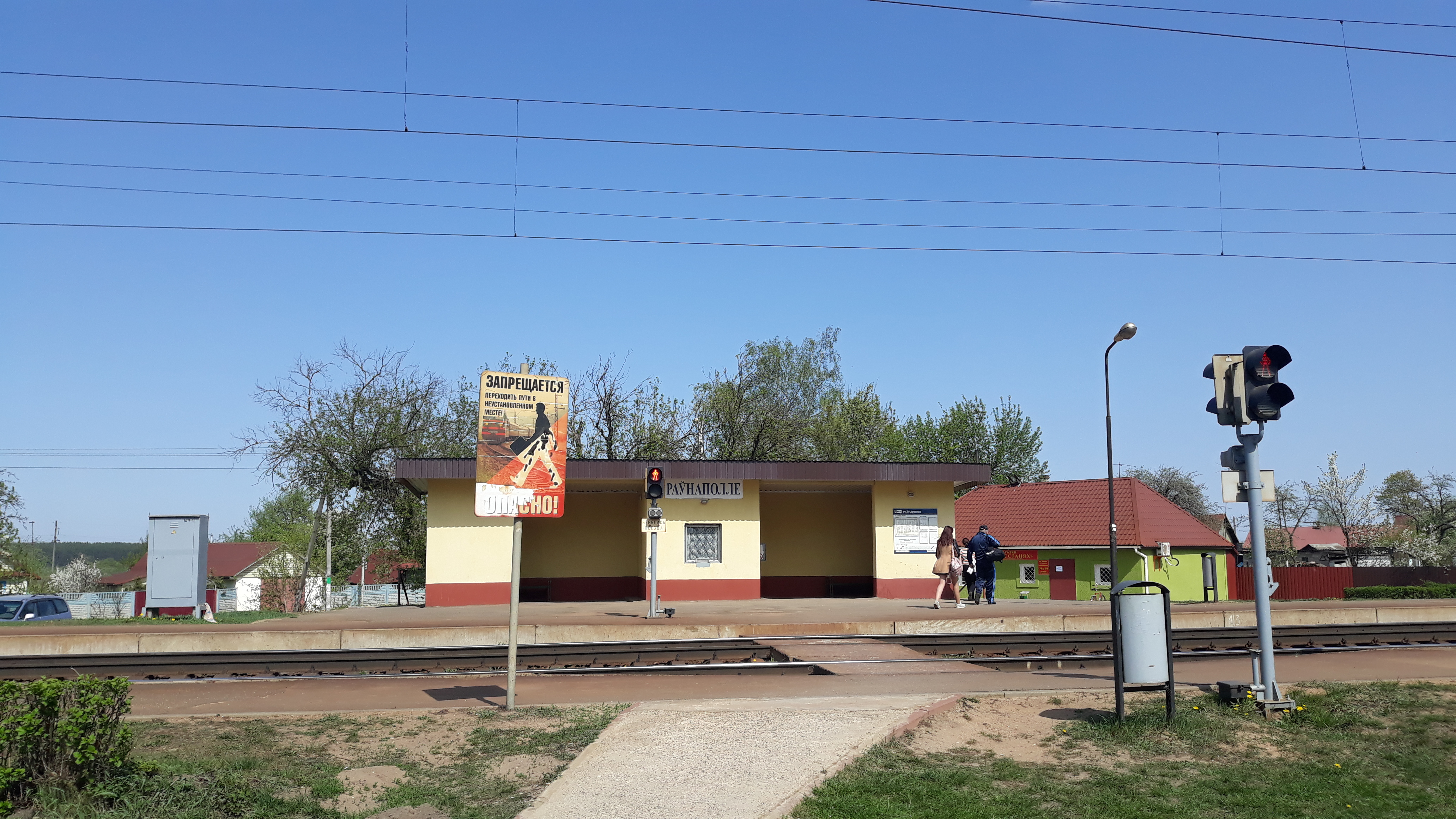 платформа Раўнаполле